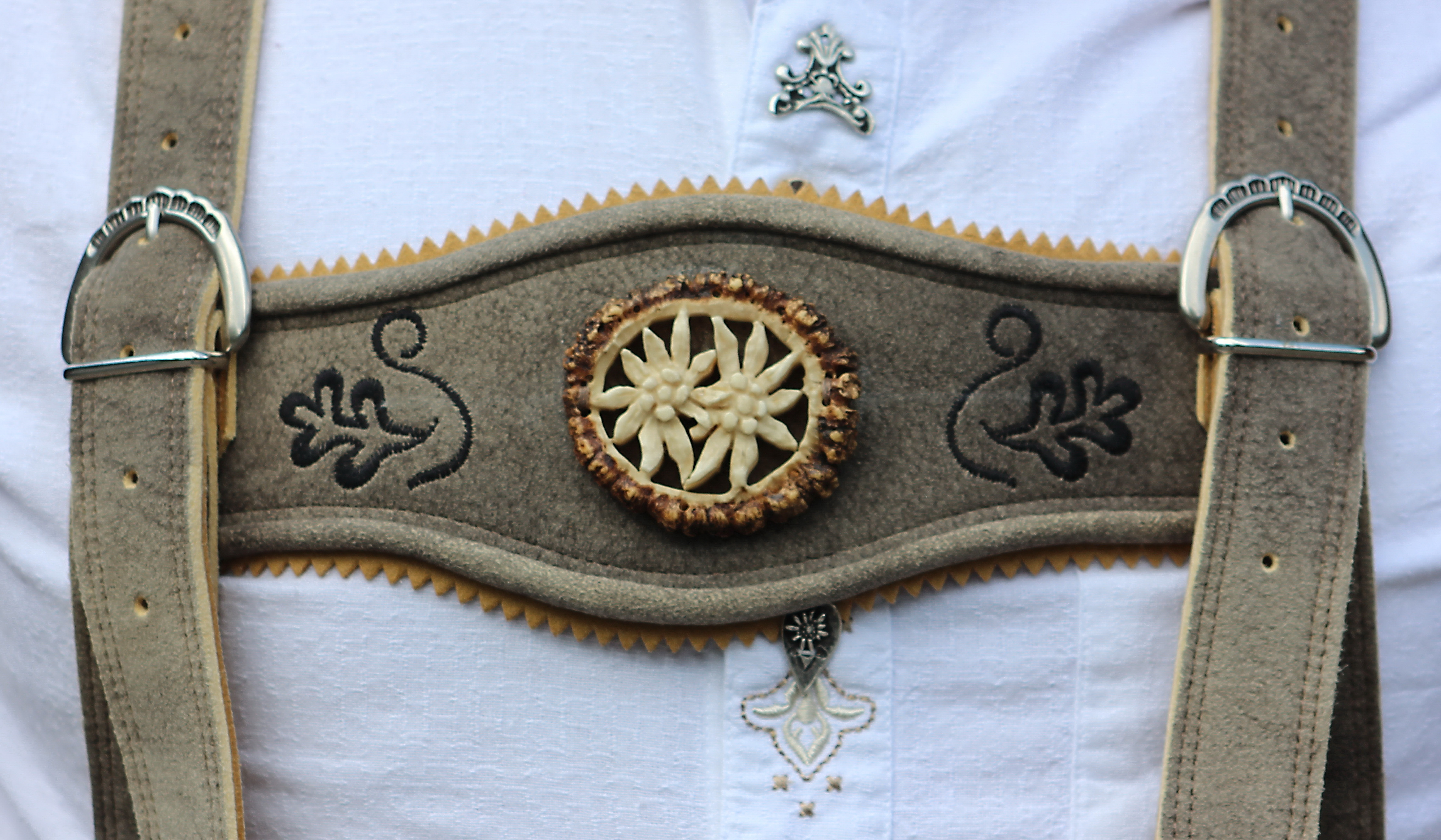 Träger einer Trachtenlederhose in sämigen Hirschleder. Geschnitzte Hirschrose und schwarze Stickerei.